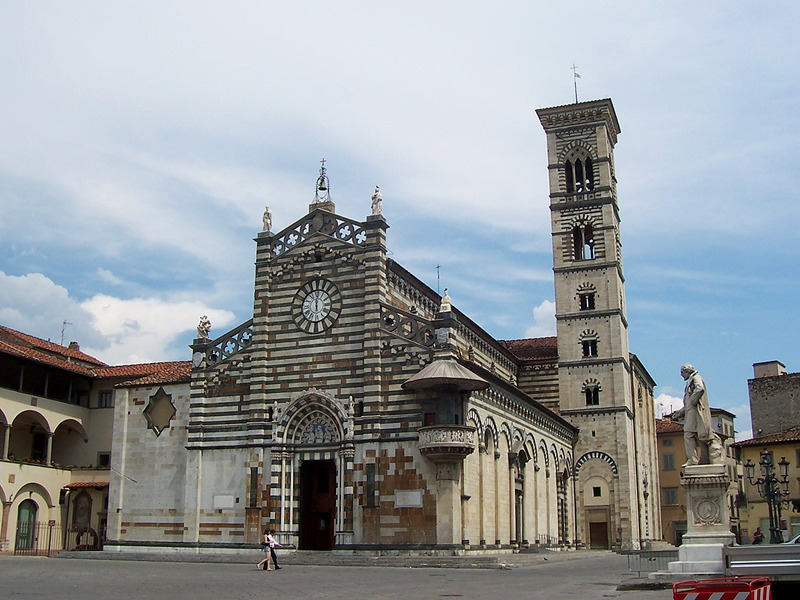 Prato - Duomo